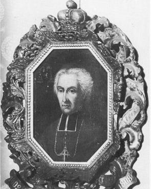 Jean-Évangéliste Zäpfel (Zaepfell)